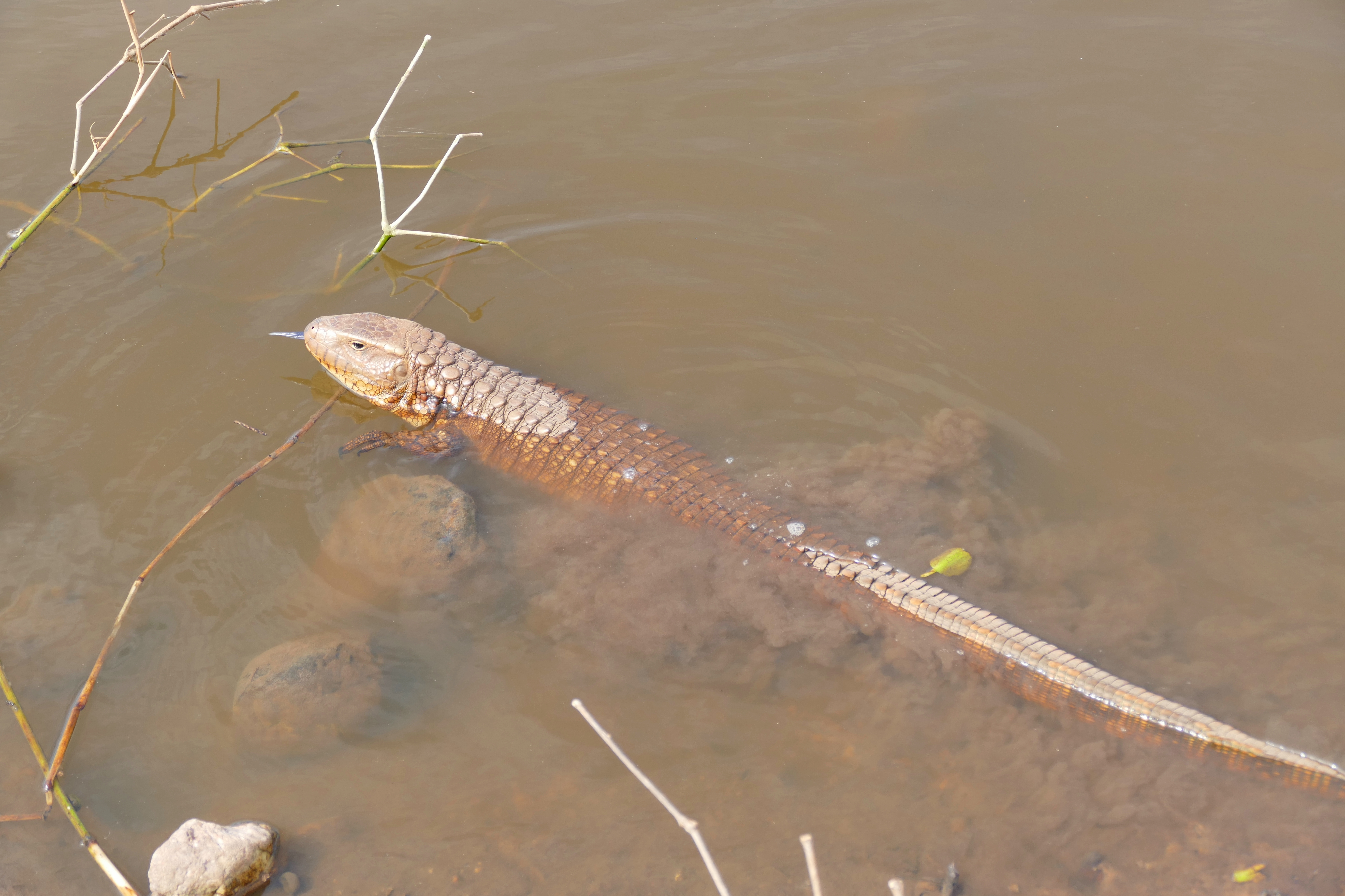 Transpantaneira, Poconé, Mato Grosso, BRAZIL